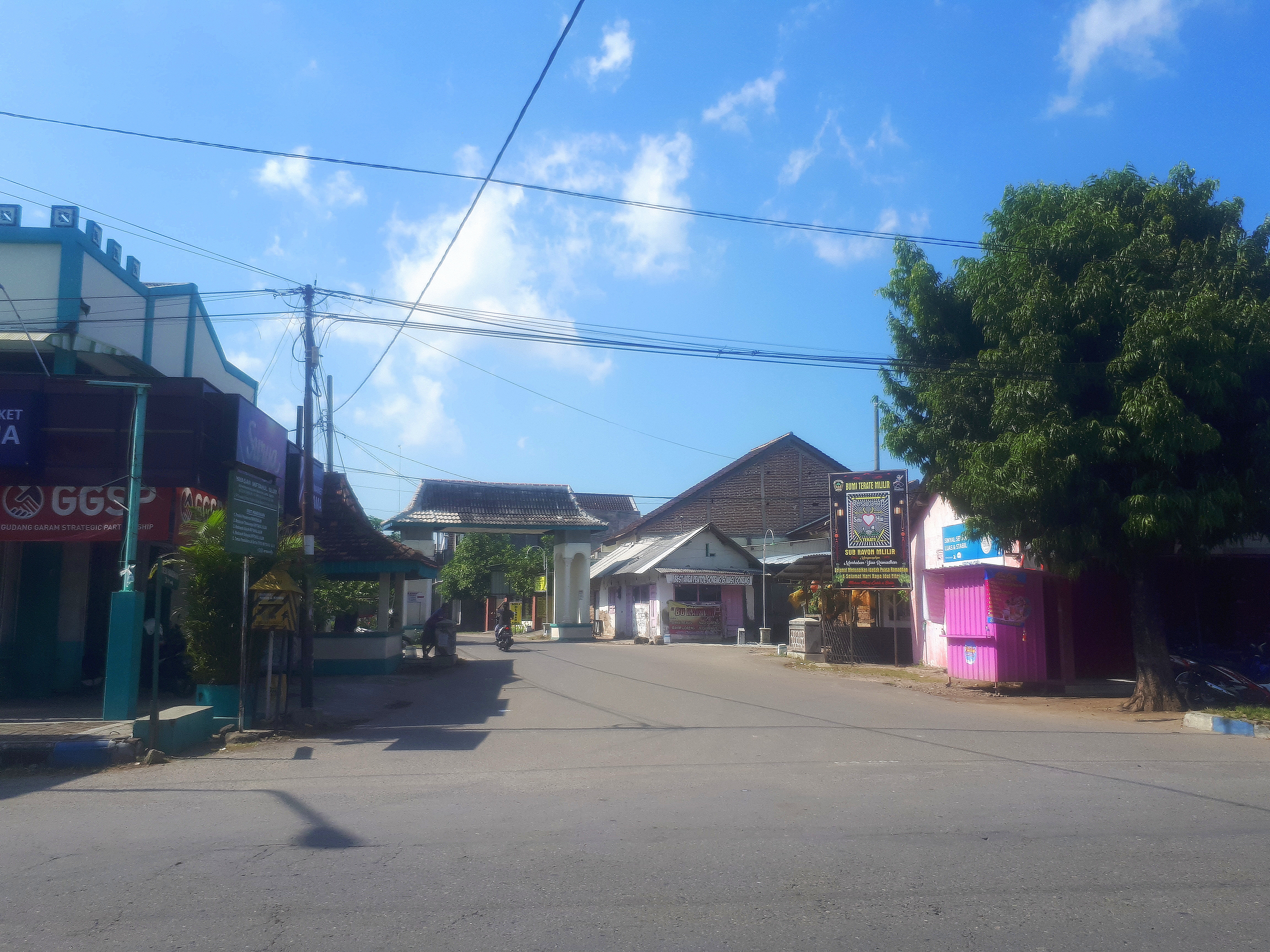 Lahan bekas bangunan Stasiun Mlilir beralih fungsi untuk jalan raya menuju Kradinan. Bangunan stasiun ini dibongkar sekitar 2001-2002